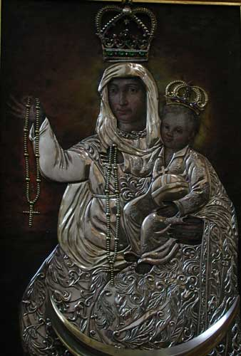 Маці Божая Ружанцовая. XVIII ст., г. Ліда